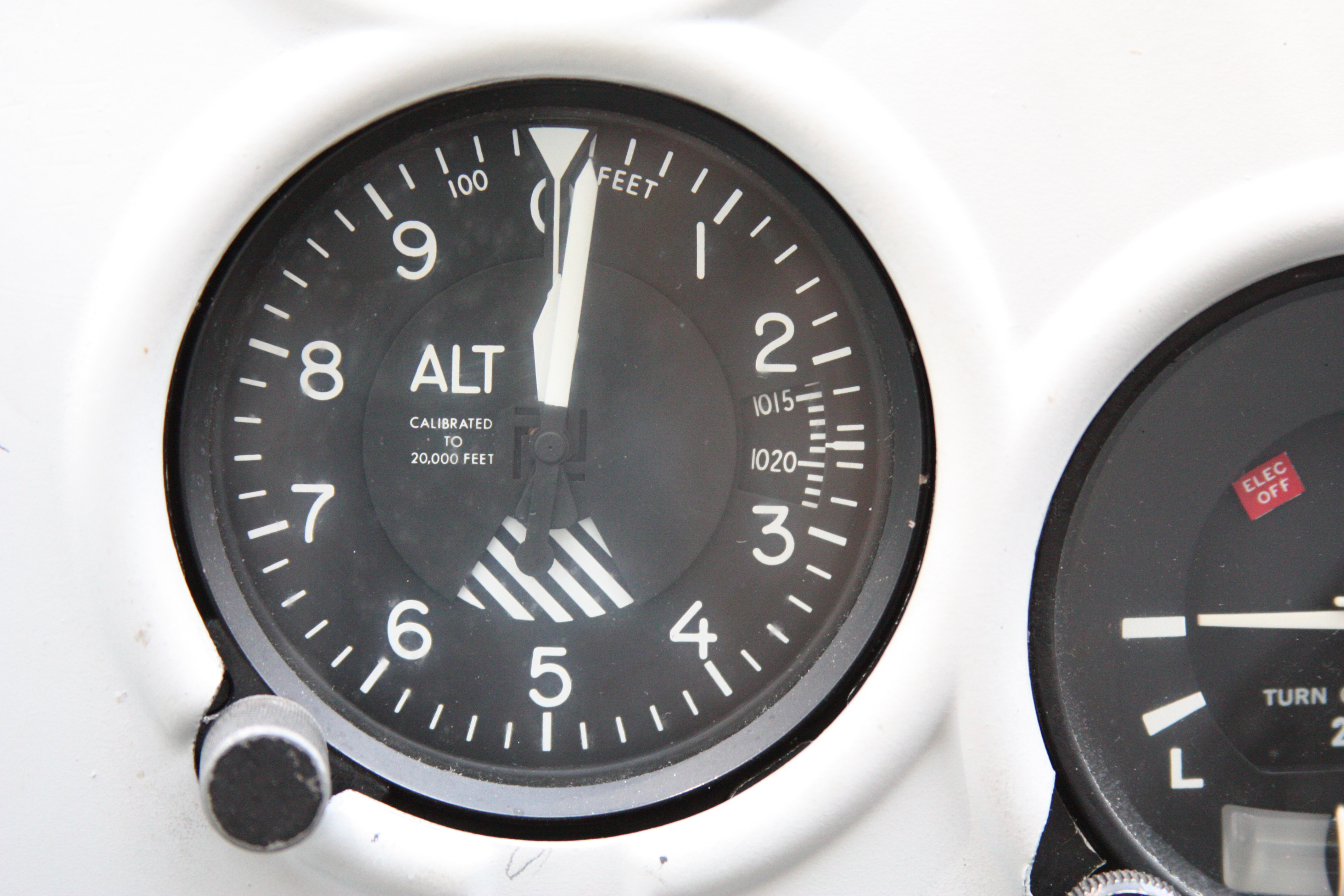 Cessna C172; cockpit instruments